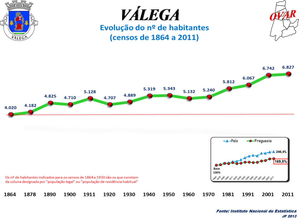 Evolução da População 1864 / 2011